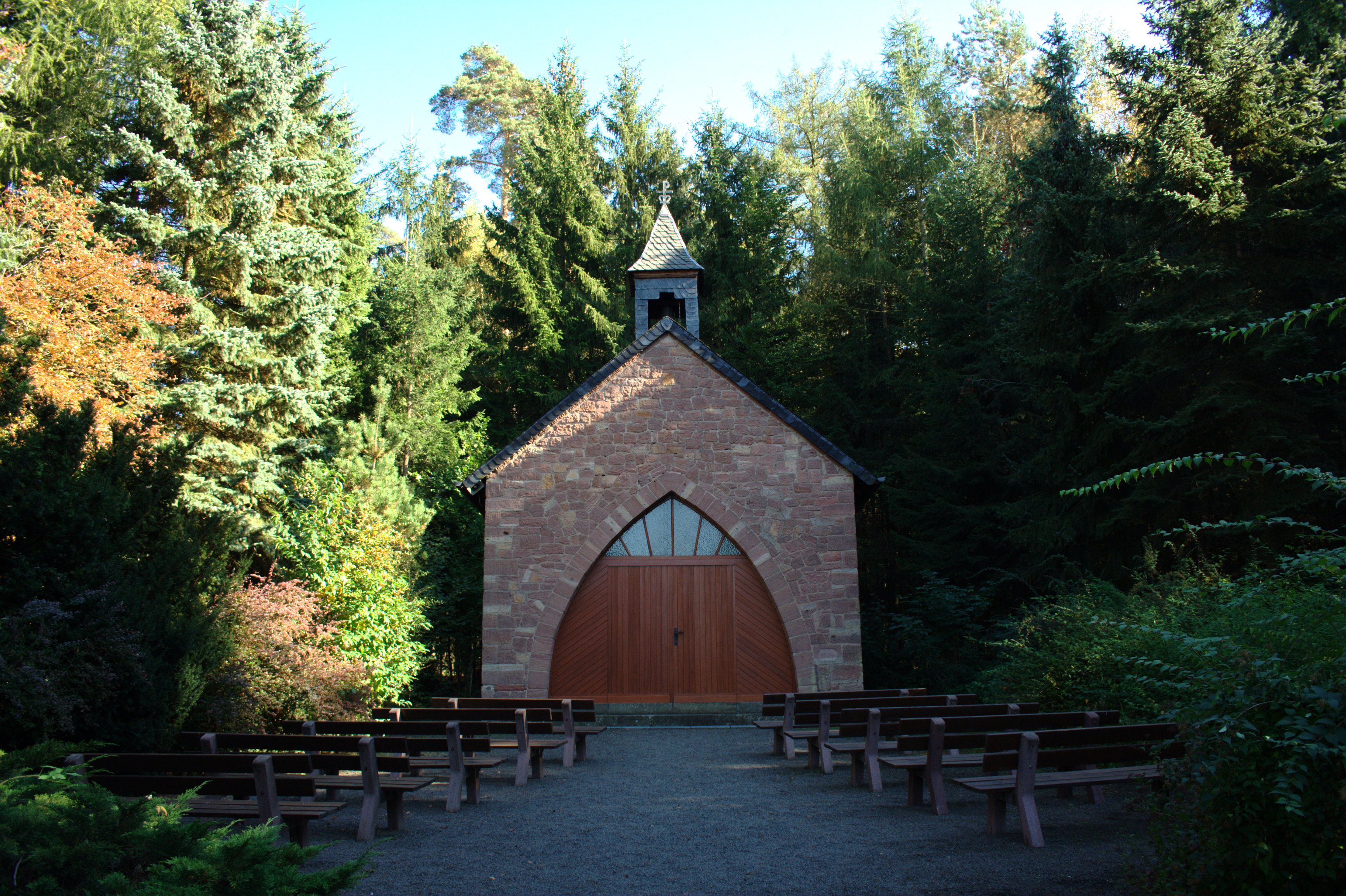 Fatima-Kapelle; erbaut 1946 in Kerzell